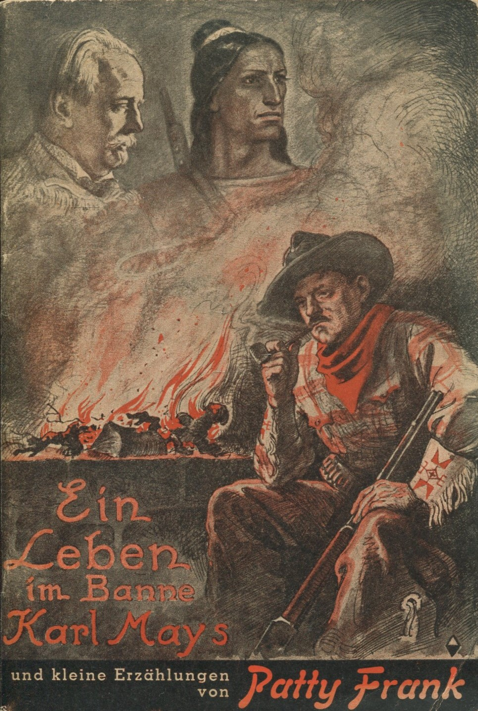 Patty Frank Ein Leben im Banne Karl Mays und kleine Erzählungen, 45. bis 54. Tsd., 1942. Broschur. Mit Porträts von Patty Frank, Karl May und Winnetou, erschienen im Karl-May-Verlag, Radebeul